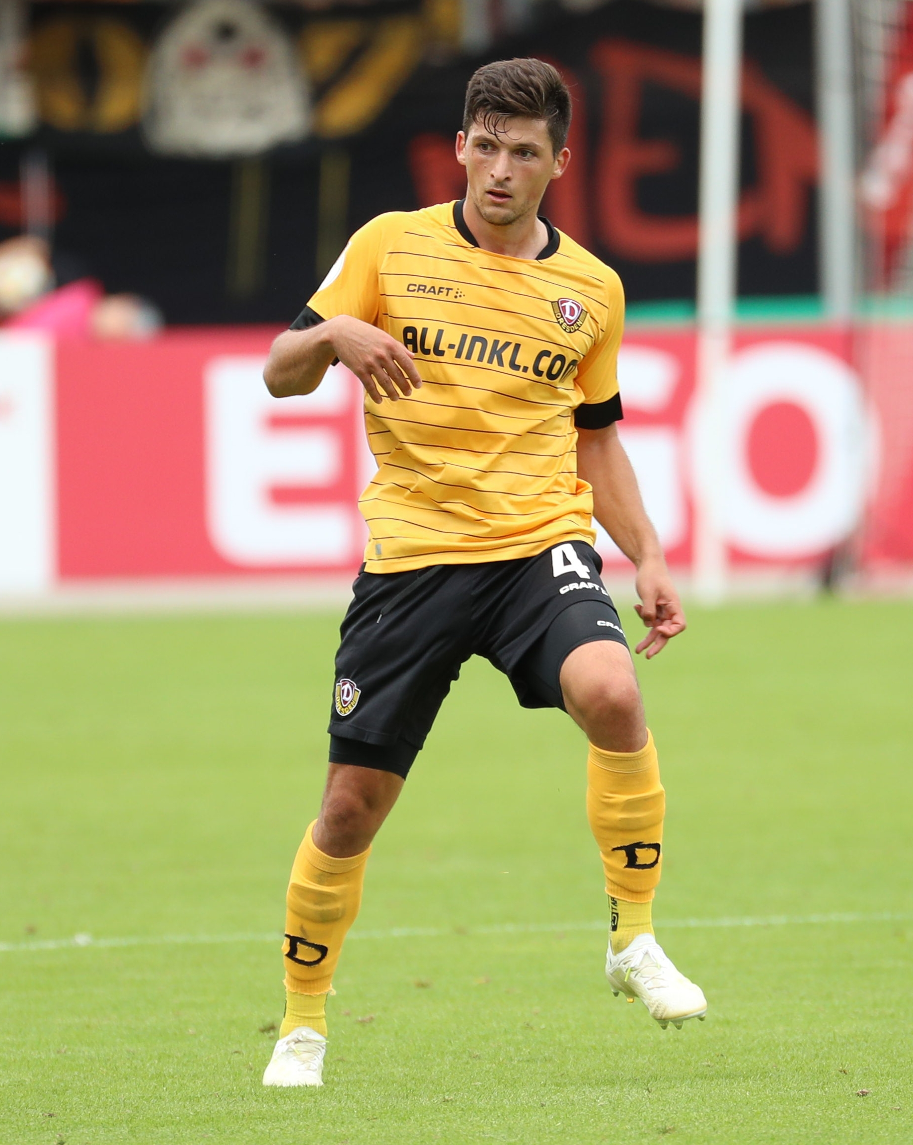 DFB-Pokal 2019/20, 1. Hauptrunde, TuS Dassendorf gegen SG Dynamo Dresden 0:3 (0:1)